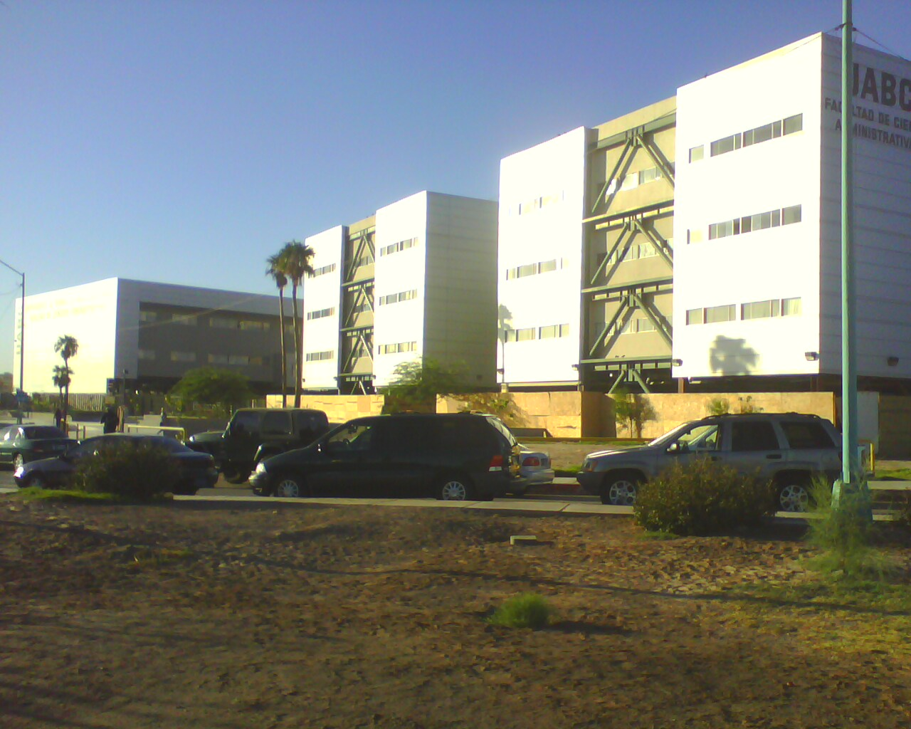 FCA Mexicali